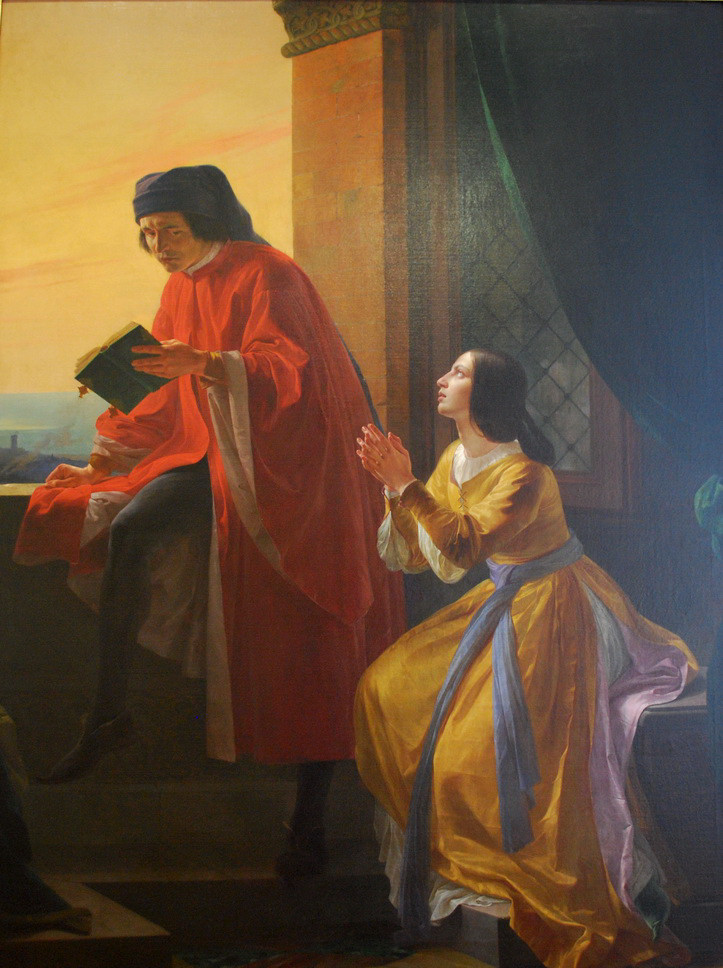 Pia dei Tolomei